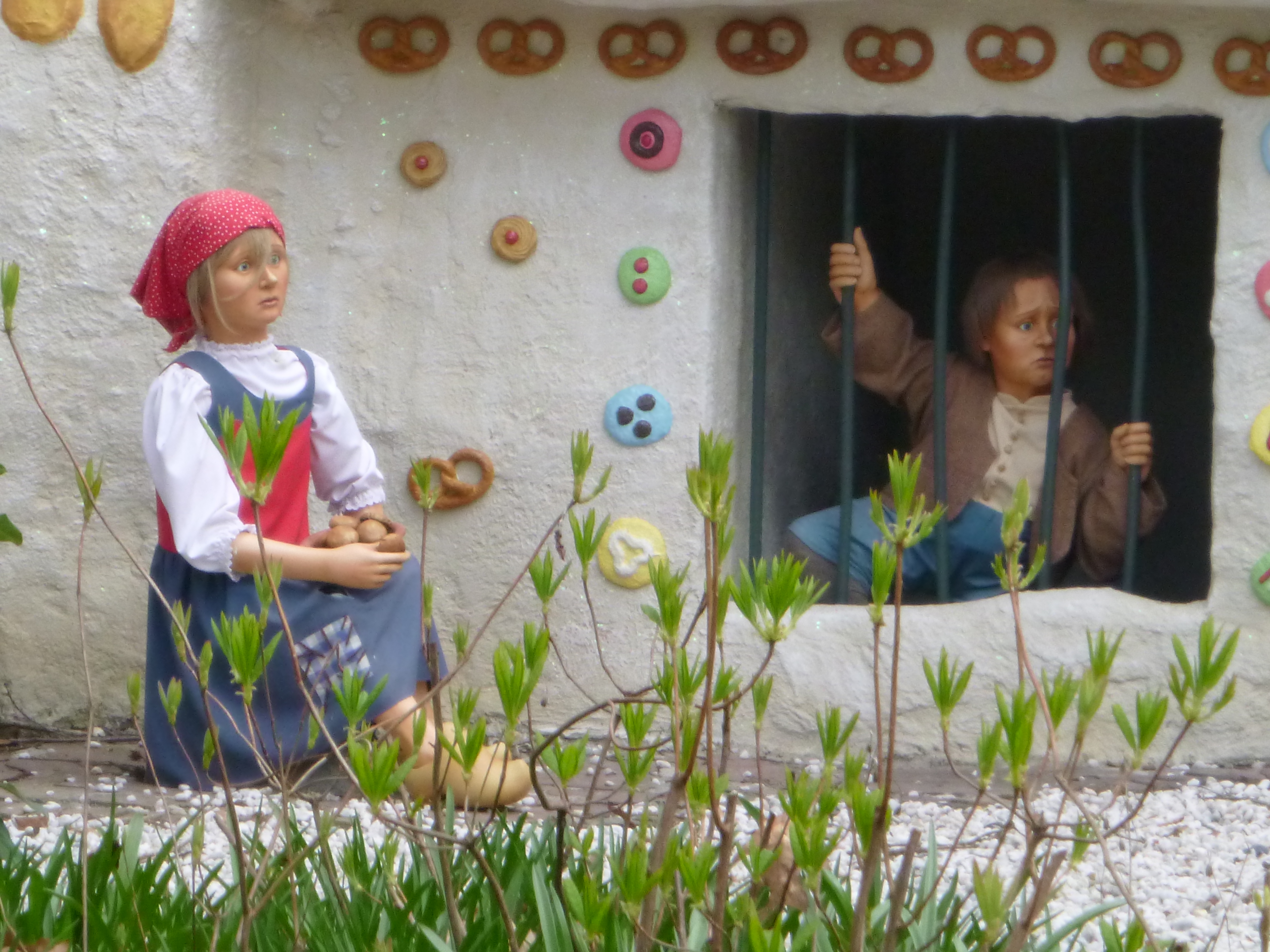 Hansel et Gretel 2017